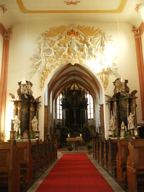 Blick in den Chorraum und auf die Seitenaltäre der Klosterkirche Sankt Florin, Kloster Schönau im Taunus